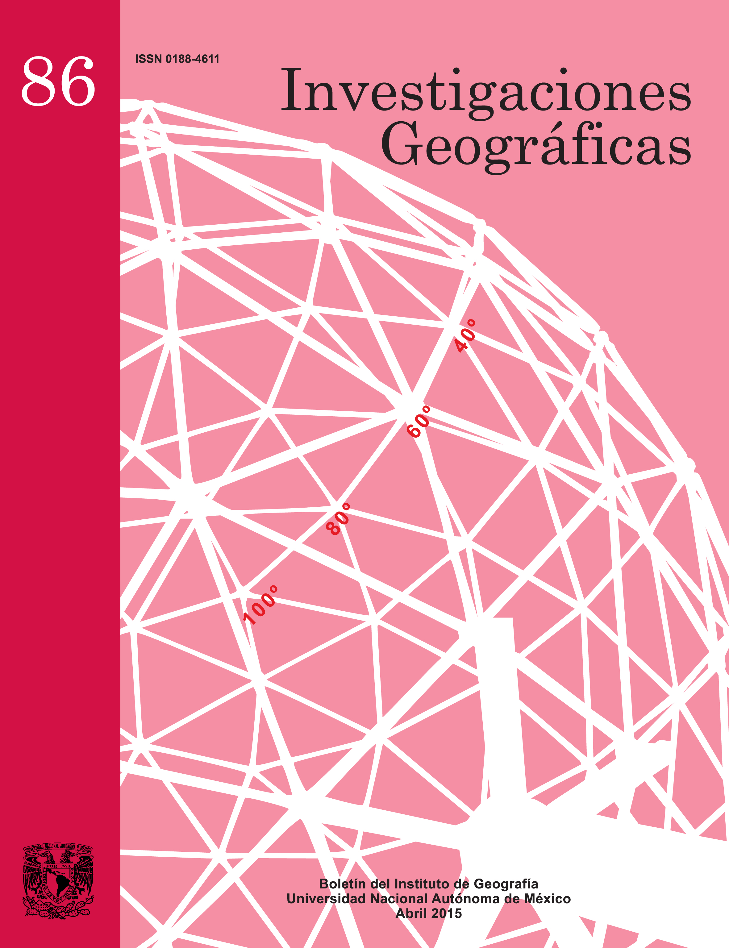 Portada del número 86 de la revista Investigaciones Geográficas, abril del 2015.